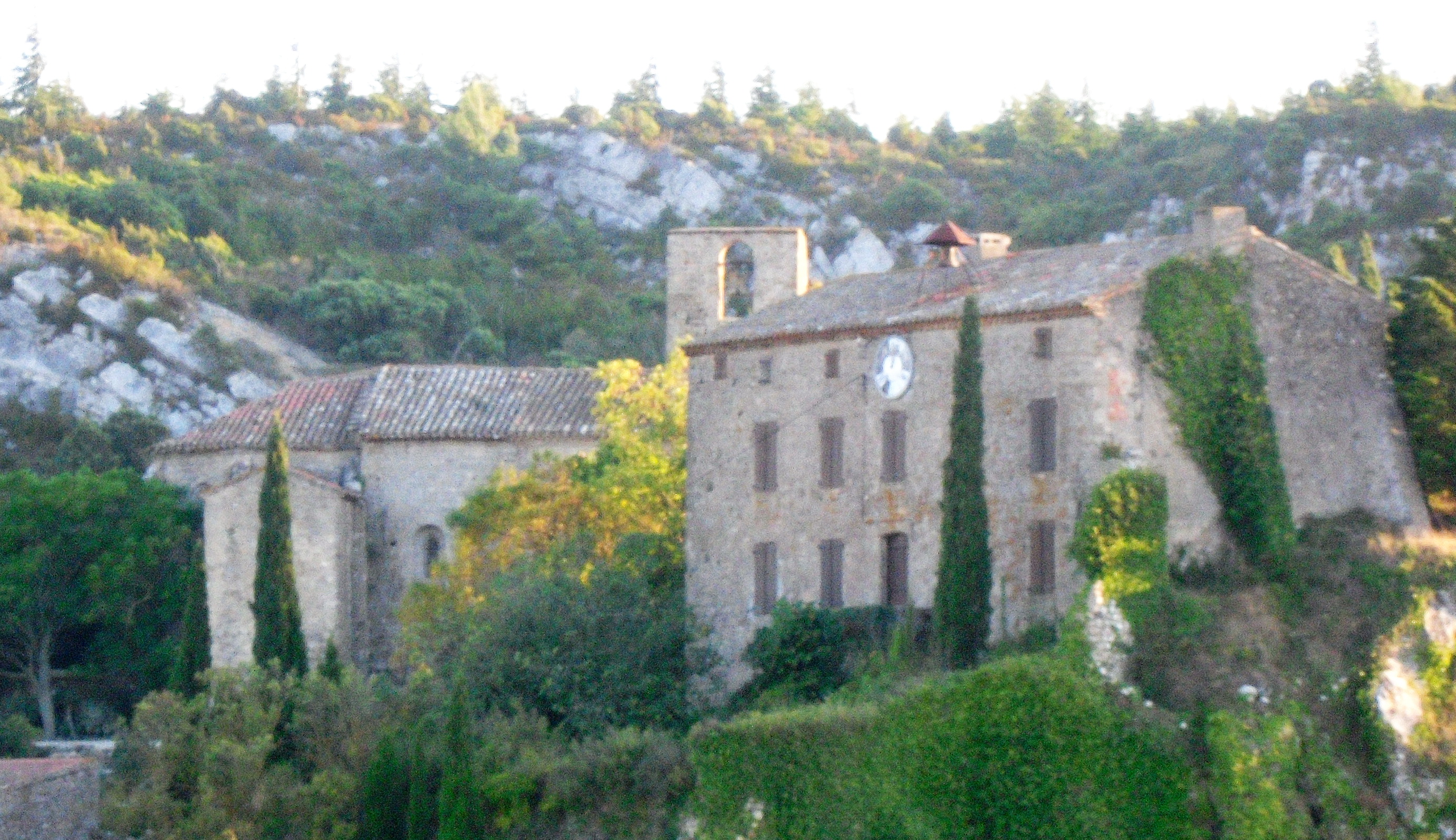 Chateau et Église Sainte-Léocadie à Fontjoncouse